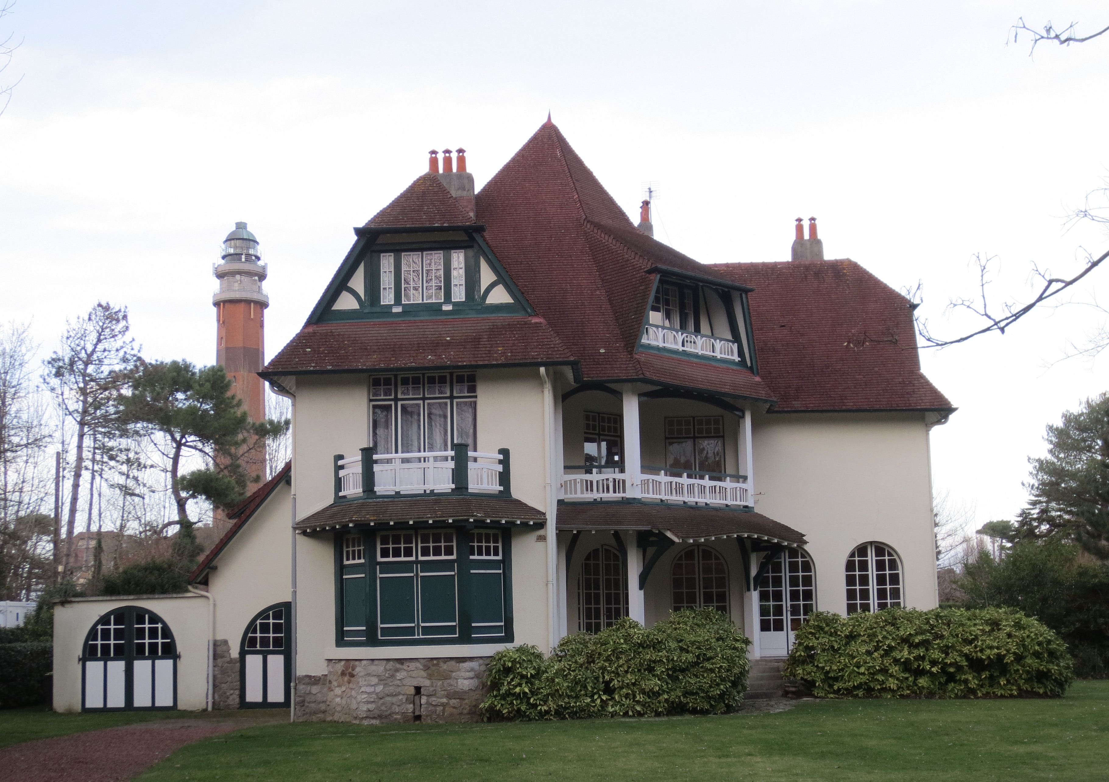 Le Touquet-Paris-Plage - Villa Le Petit Trianon - 277, avenue John Whitley - Architecte Arsène Bical.